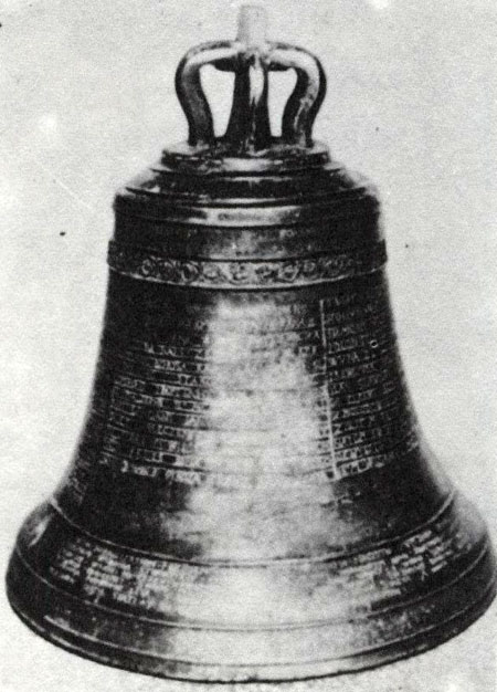 Моладаўскі звон. 1583 год